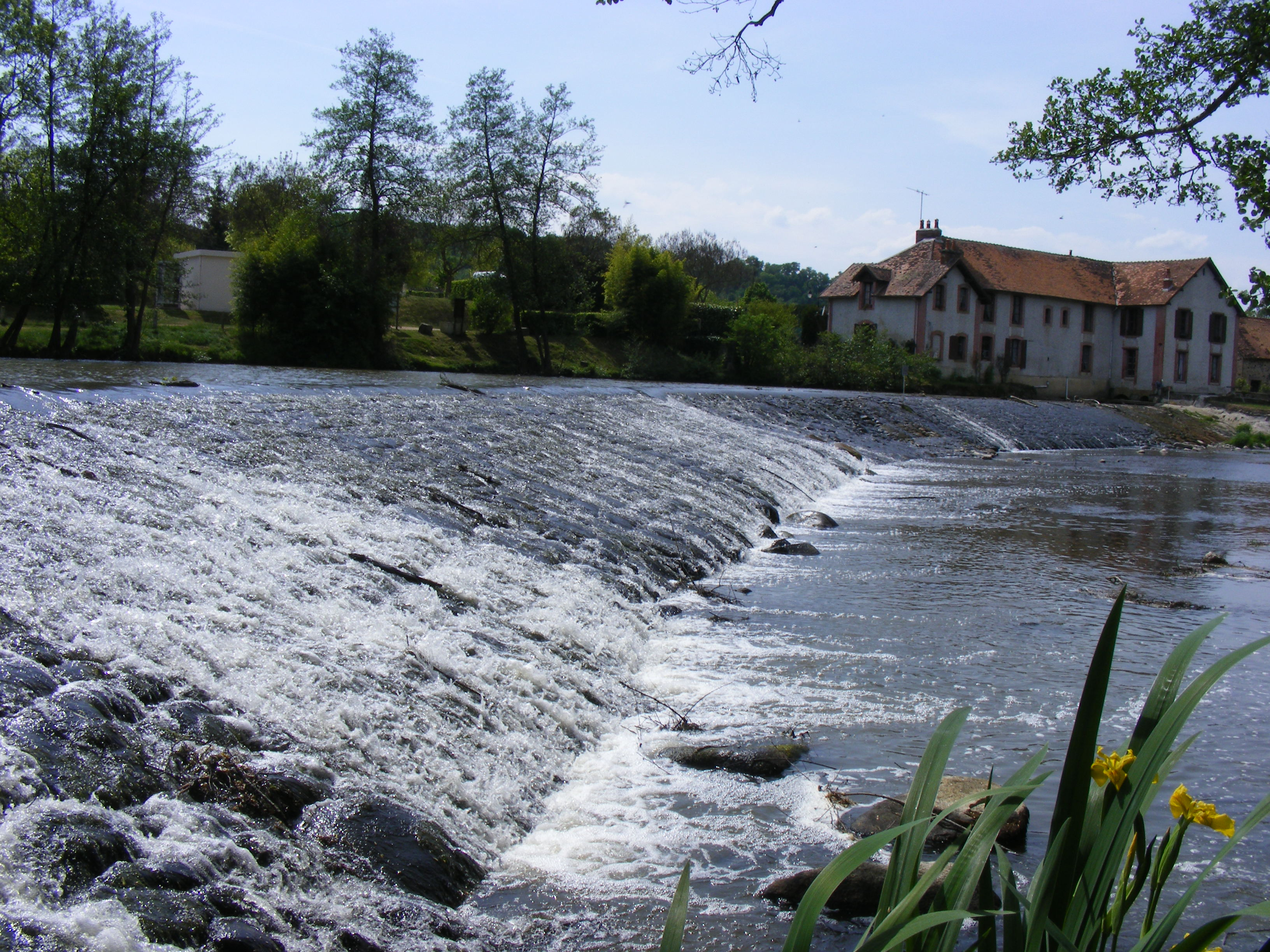 Rivière Aumance dans le village d'Hérisson Mai 2011